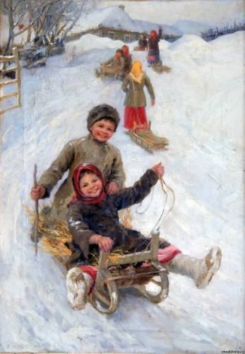 Сычков Ф.В. Катание с горы зимой. 1889 г. Вязниковский музей. Картинная галерея. Собрание С.И. Сенькова.